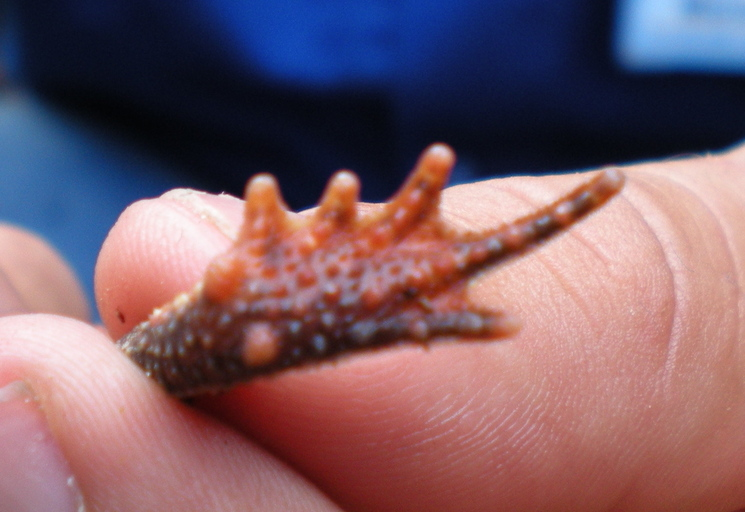 Bufo hoogmoedi